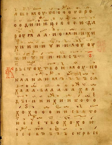 Тропарь шестого гласа, поемый на Воздвижение Креста: "Кресту Твоему покланяемся Владыко, и святое Воскресение Твое славим." «Кондакарь крюковый», исход ХІІ века